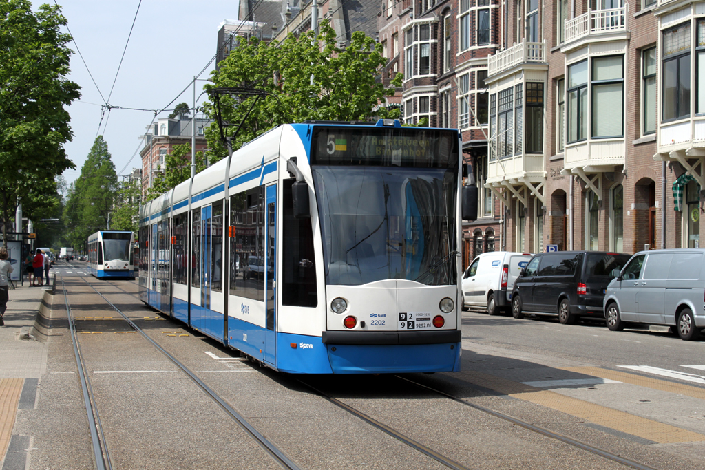 GVB tram type Combino C2A, wagen 2202, lijn 5, Paulus Potterstraat (Amsterdam)